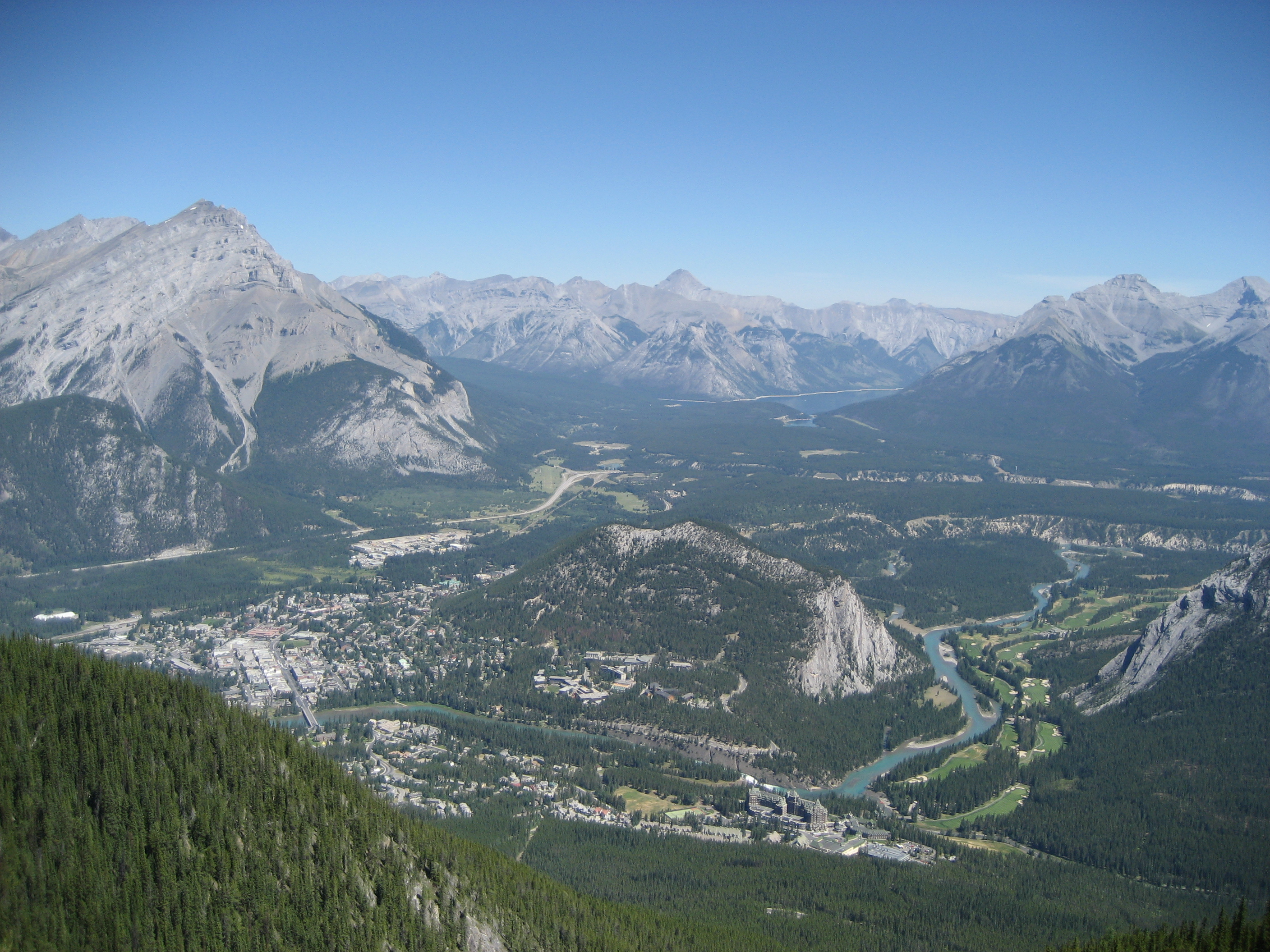 Ville de Banf, Alberta (Canada).